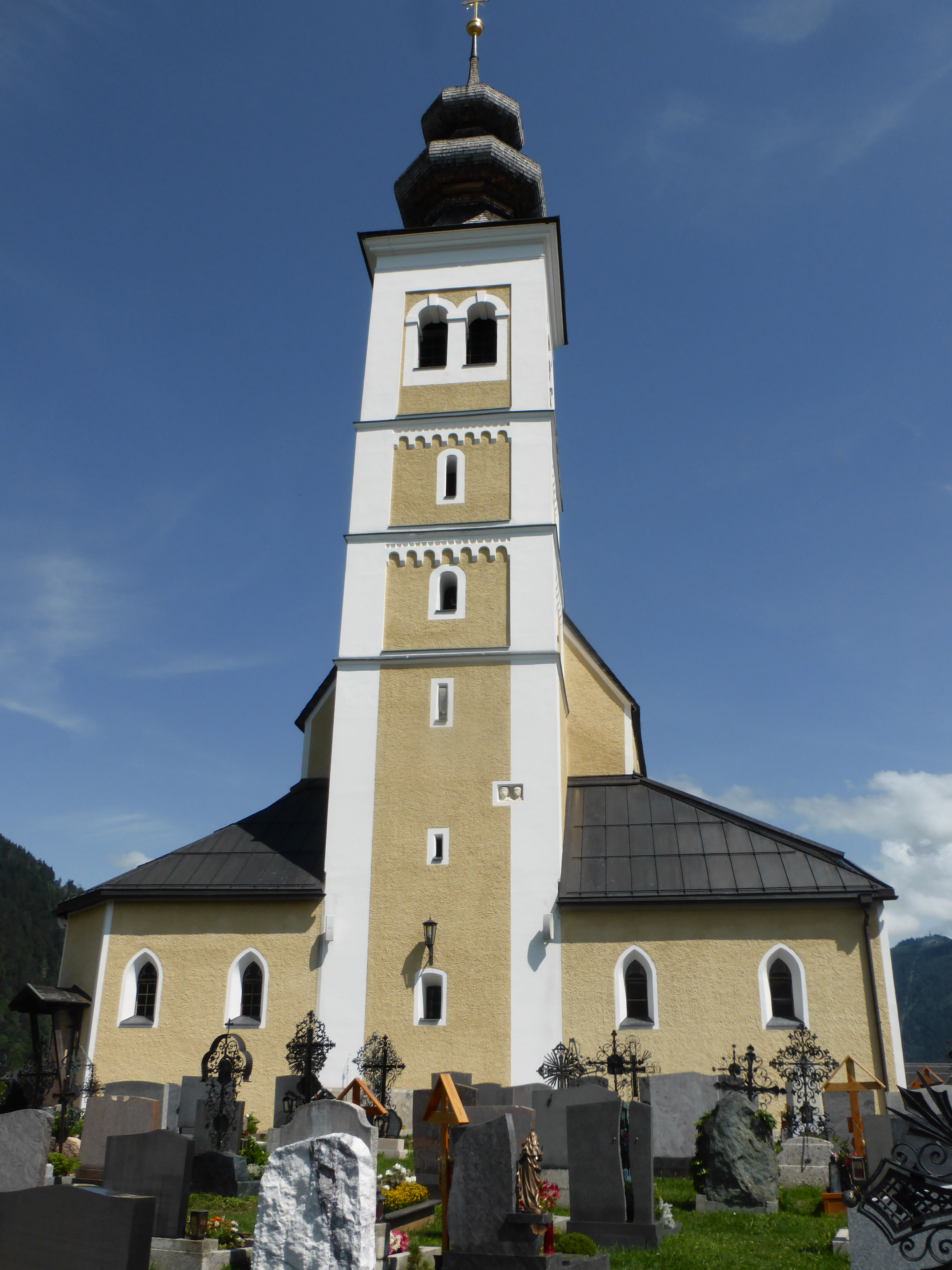 Kath. Pfarrkirche hl. Vitus-13